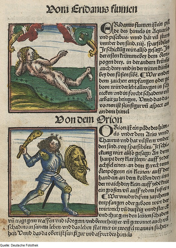 Original image description from the Deutsche Fotothek Astronomie & Sternbild